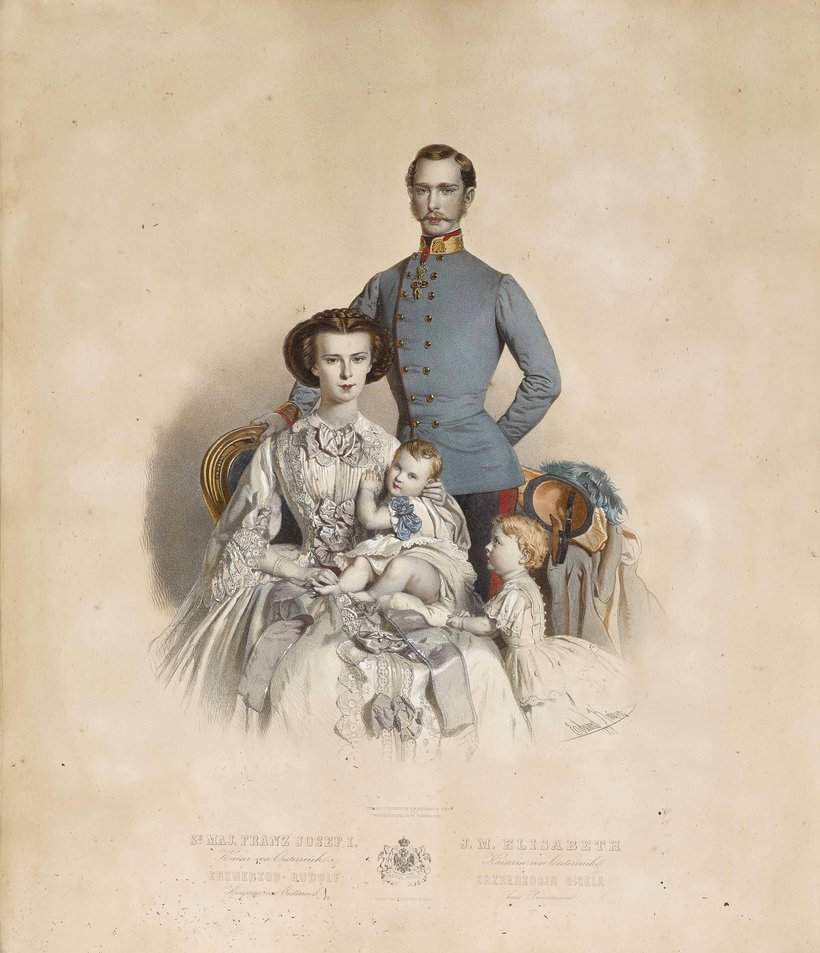 Kaiser Franz Joseph I. und Kaiserin Elisabeth von Österreich mit ihren Kindern Erzherzogin Gisela und Kronprinz Rudolf